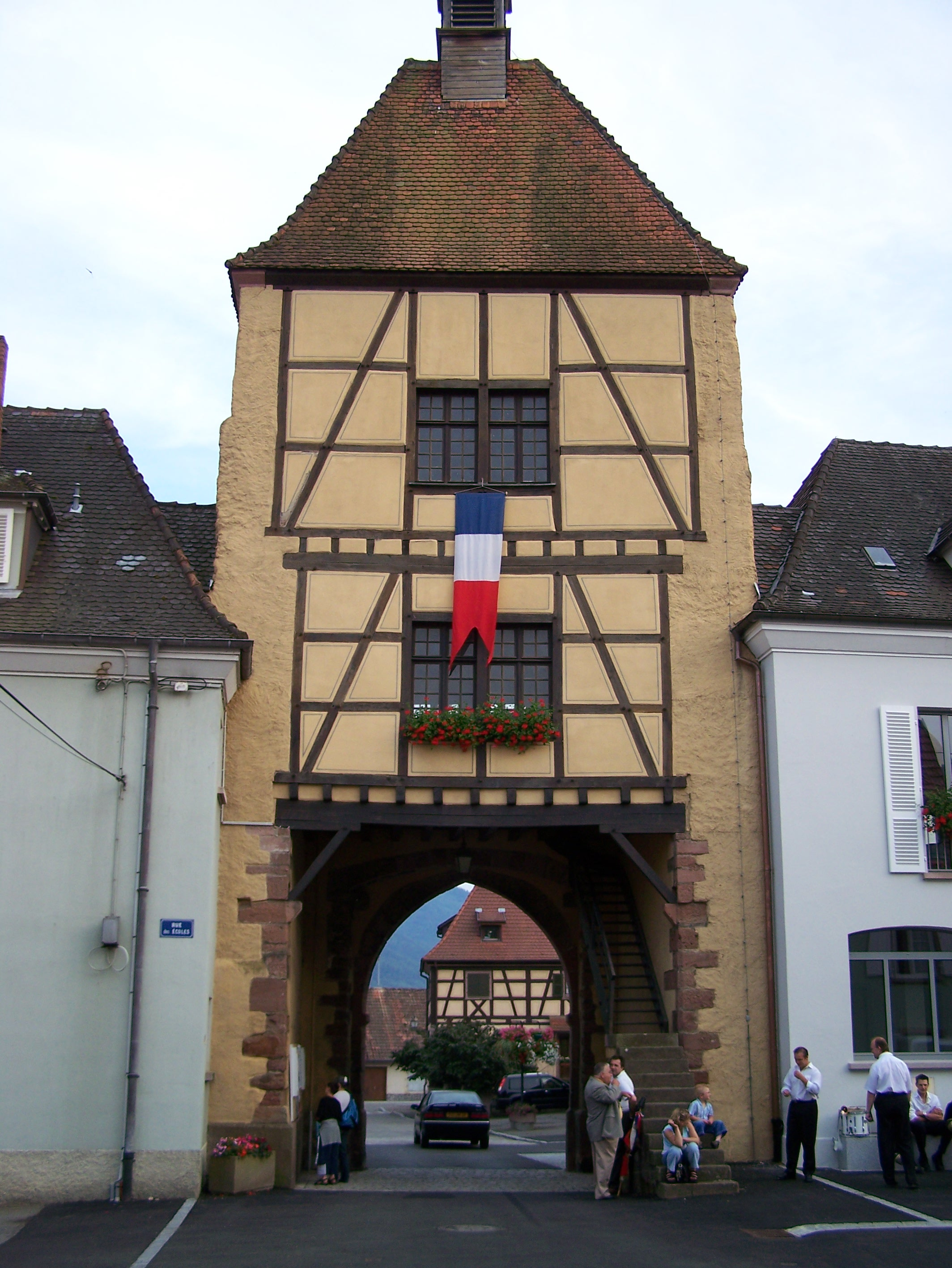 Antica porta Foto scattata personalmete Madaki agosto 2006